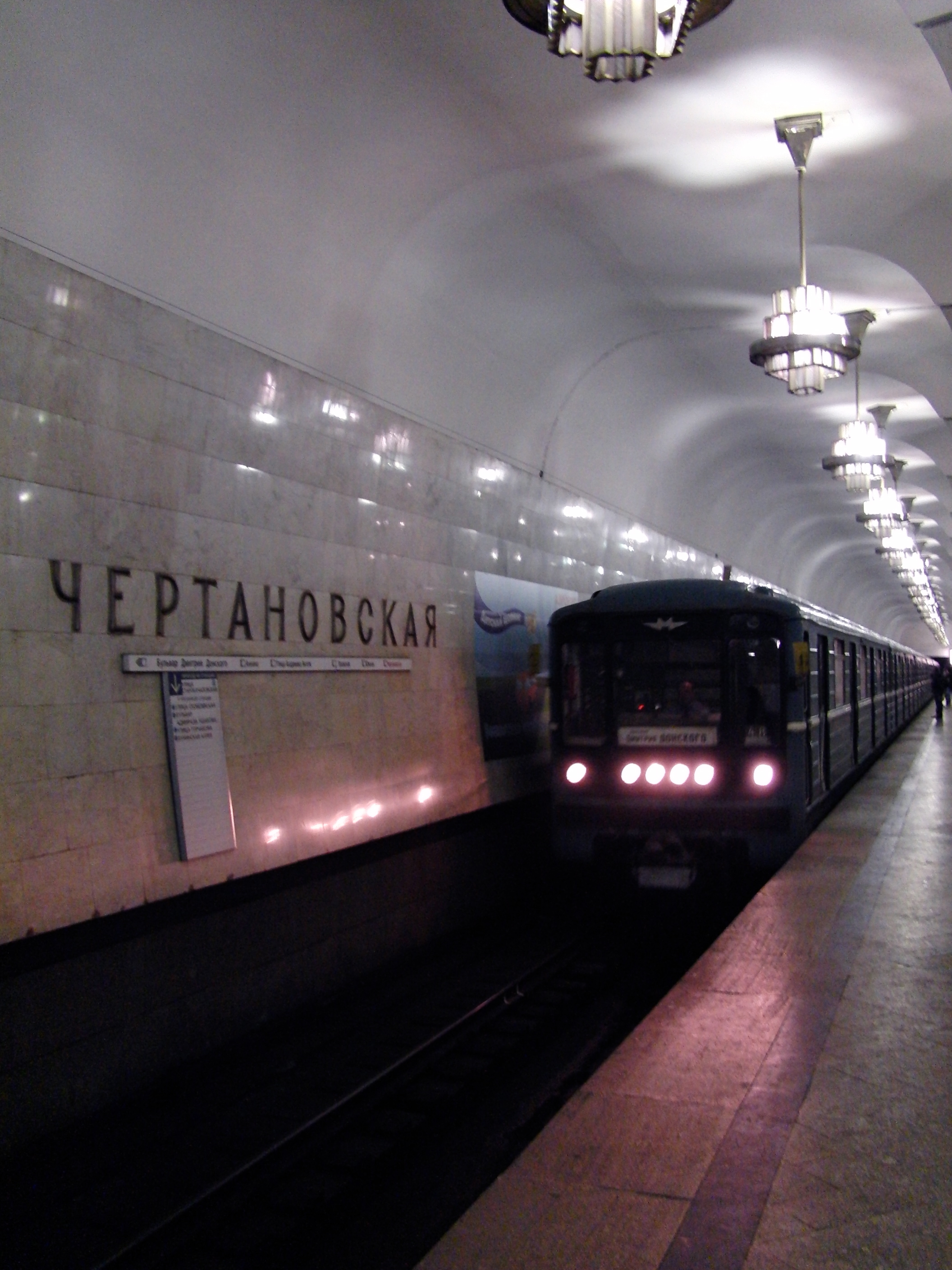 Chertanovskaya (Чертановская)